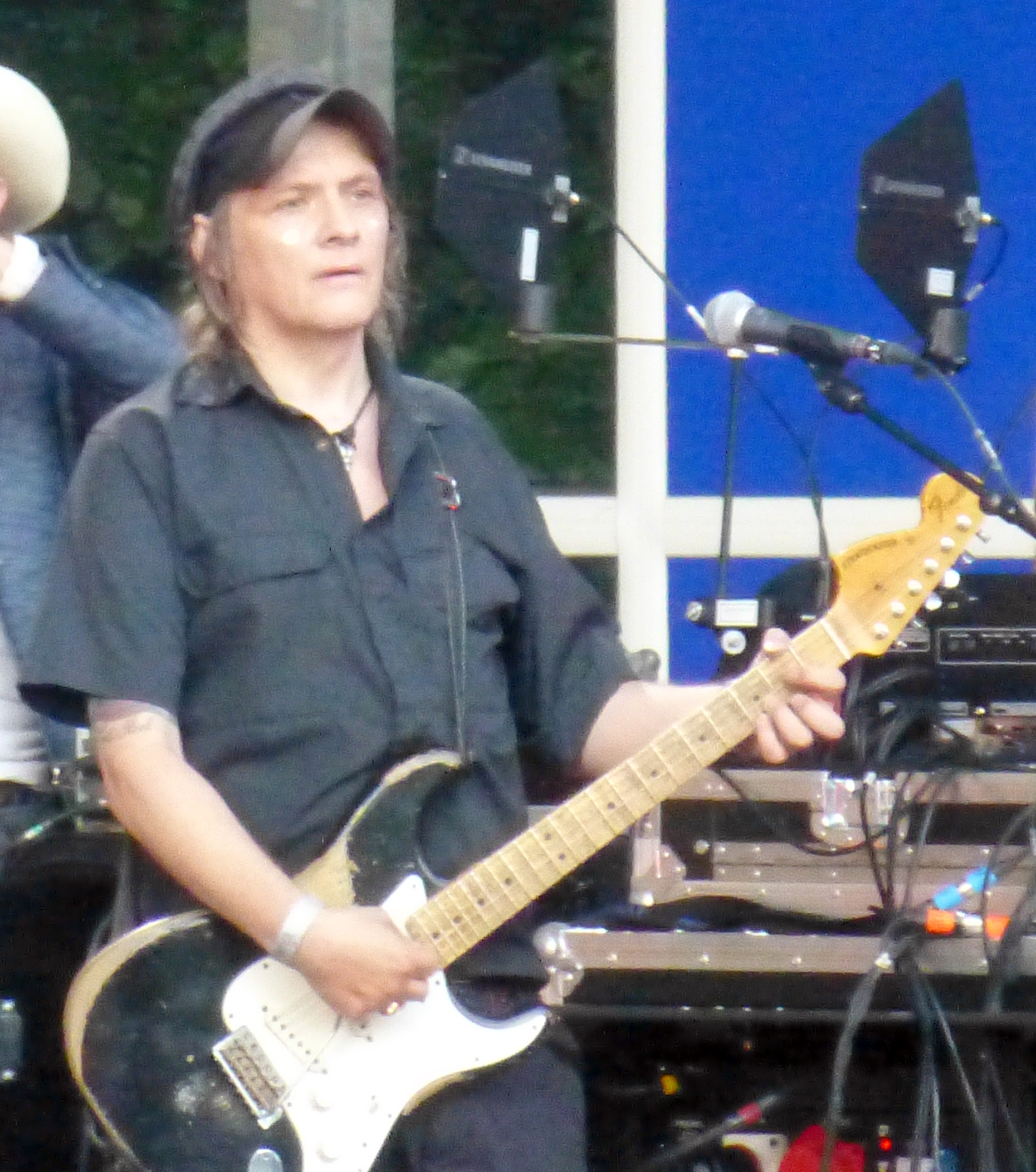 Peter Schneidermann alias Peter Peter spiller i 2016 sammen med Lars Hug, her i Friheden Aarhus